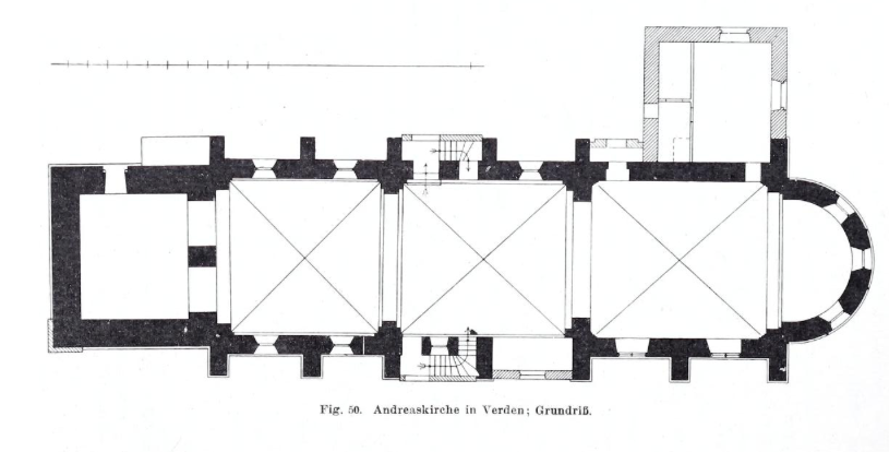 Grundriss der Andreaskirche in Verden